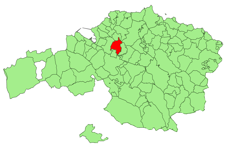 Loiuko udalerriaren kokapena.